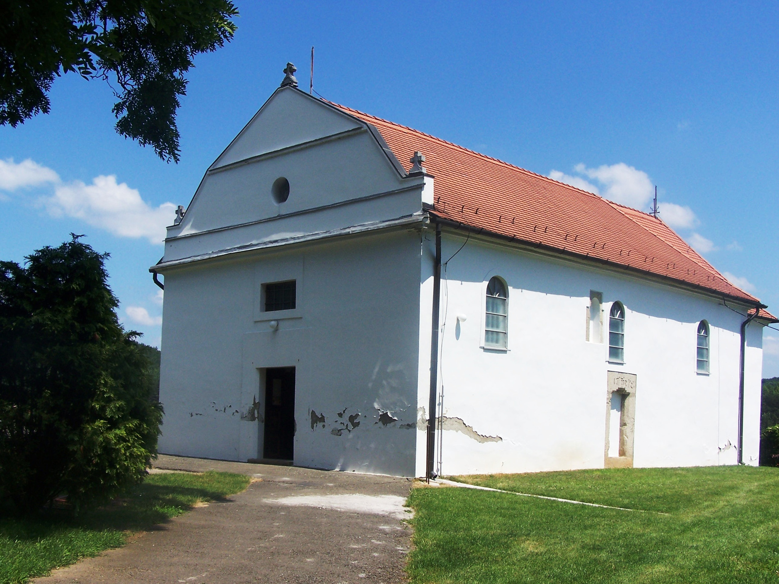 R. k. templom (Szentlélek) (Bükkszék, Templom utca) This is a photo of a monument in Hungary, Identifier: 5445